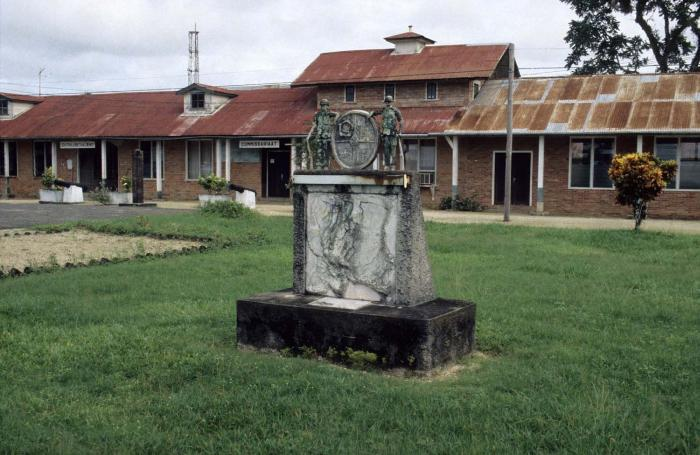 Dia. Monument ter nagedachtenis aan de Revolutie 'de dag der bevrijding en vernieuwing' (25 februari 1980)